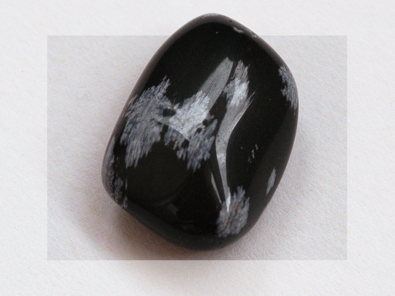 Schneeflockenobsidian als Trommelstein; ca. 3 cm lang